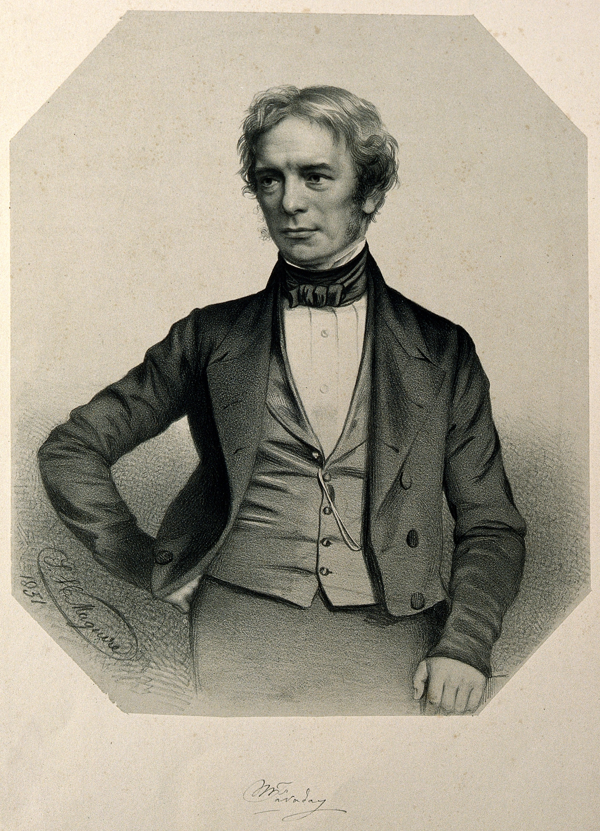 Genre/Technique: Portrait prints. Lithographs. Subject name: Faraday, Michael, 1791-1867.